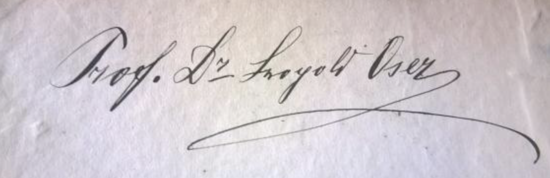 Signature